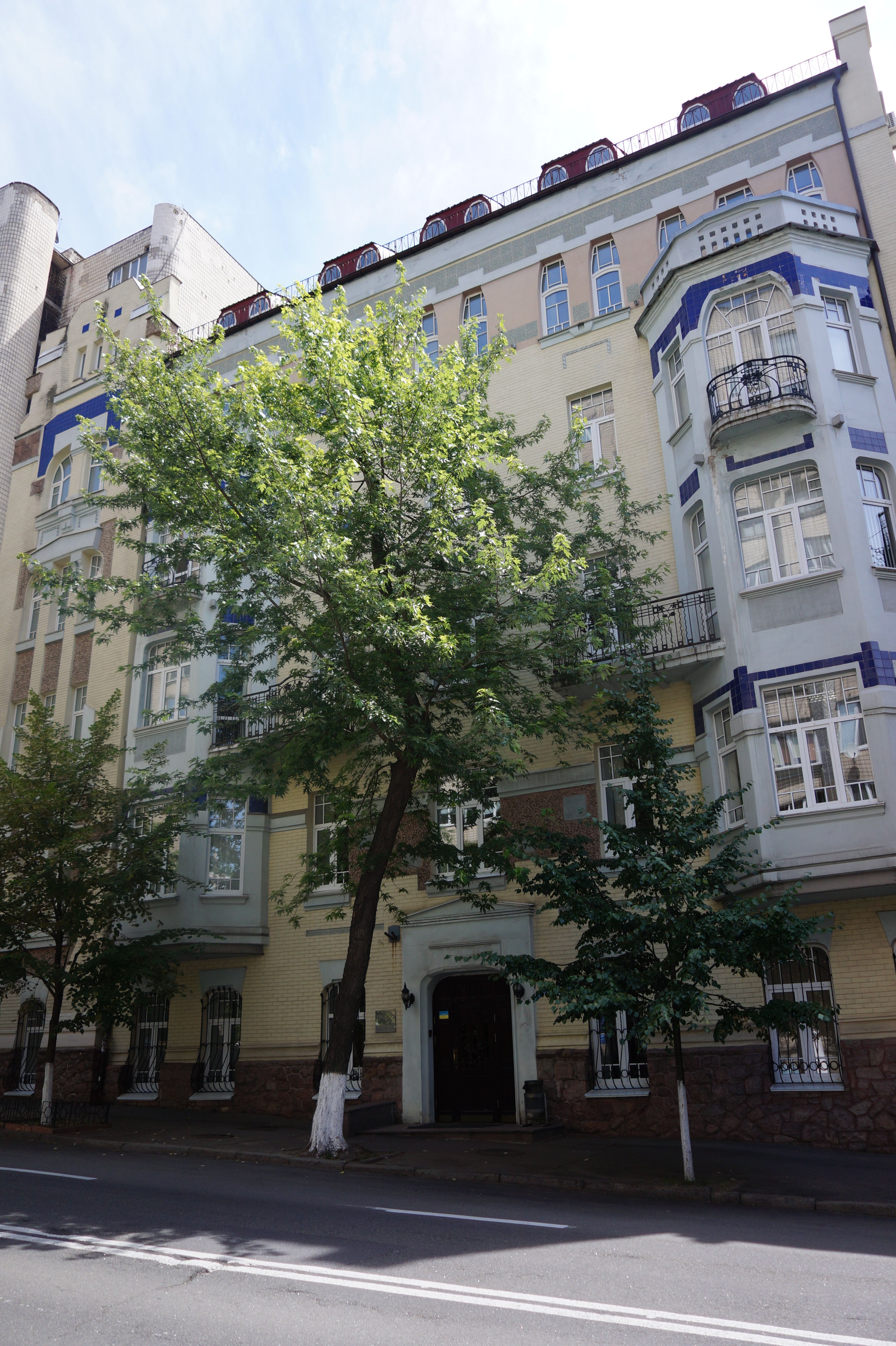 Будинок прибутковий, в якому містився Київський учительський інститут, Київ, Гончара Олеся вул., 65